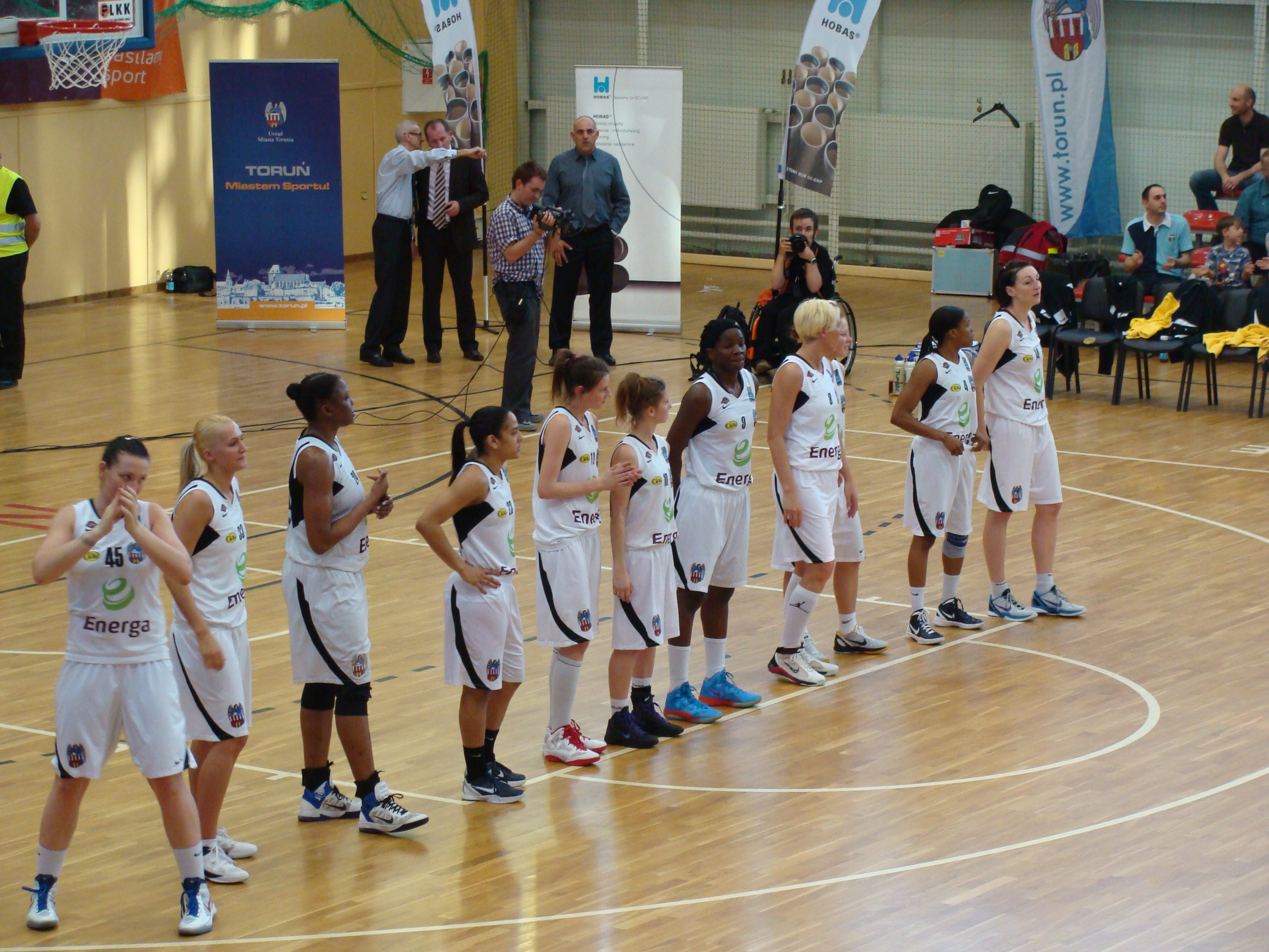 Zespół Katarzynek Energi Toruń przed meczem o 3. miejsce PLKK z Lotosem Gdynia